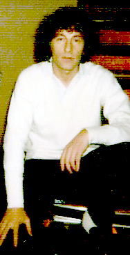 Alain Souchon, chanteur et acteur français, en 1978.